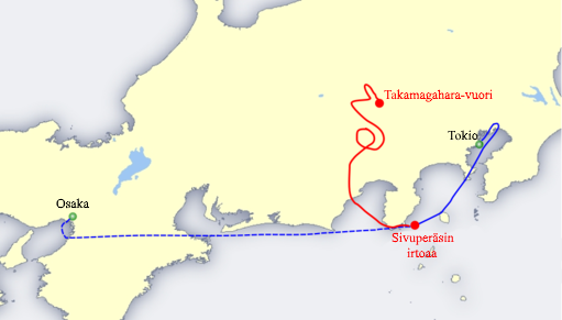 Lennon 123 reitti.